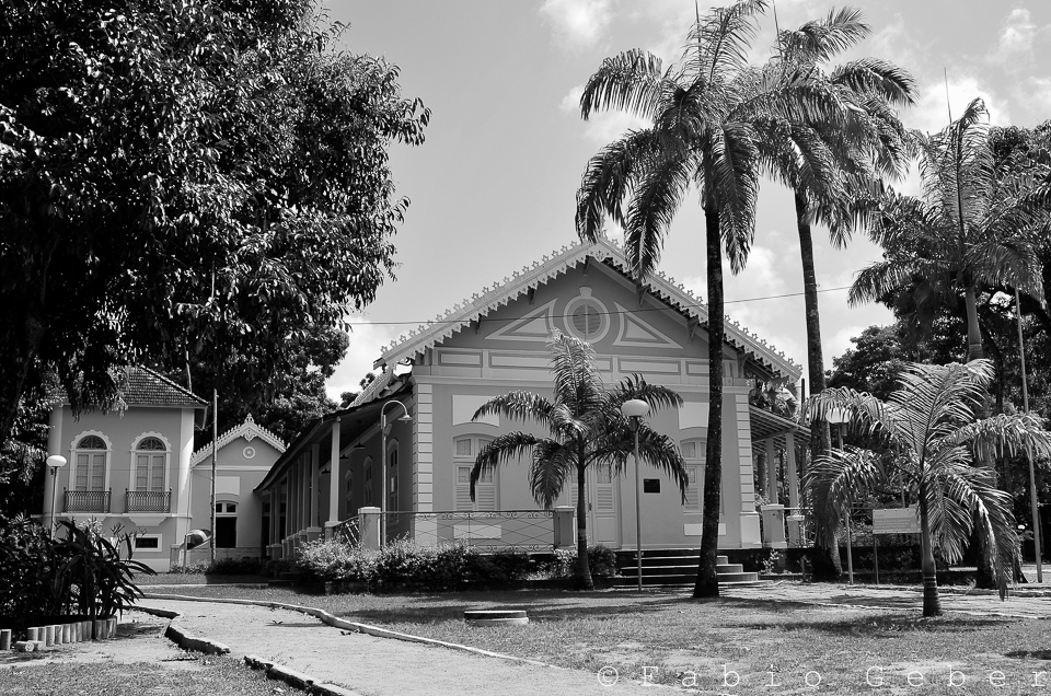 Casarão do Sítio da Trindade, Recife - PE